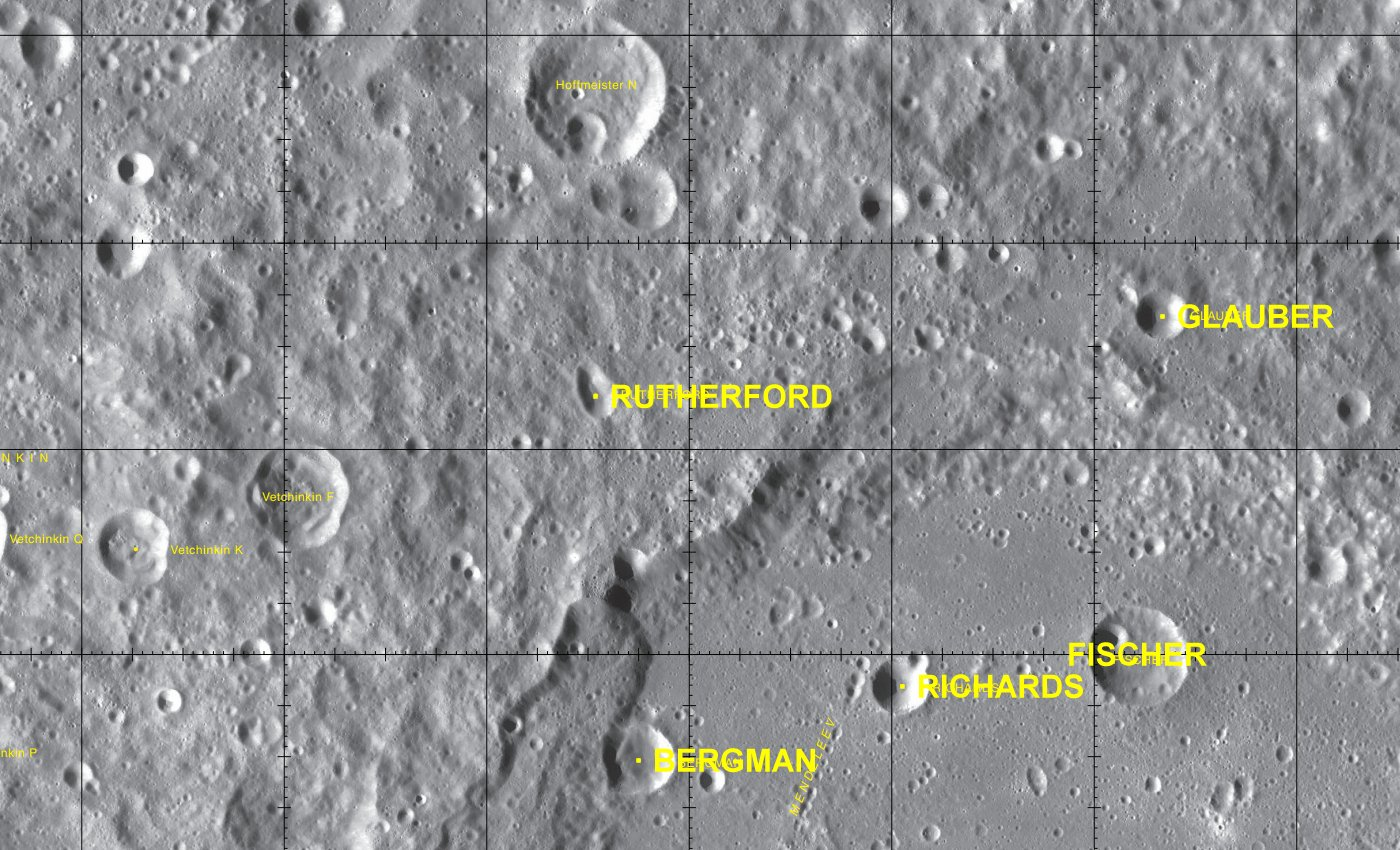 Cráter lunar Rutherford. Localización. (Imagen LRO)